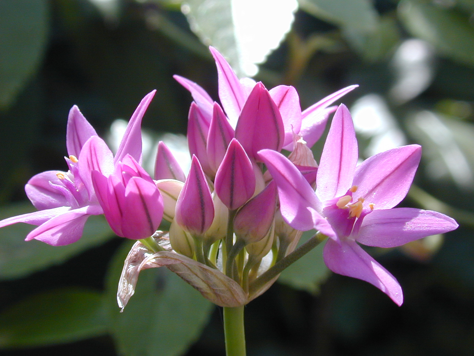 allium author: Zanchetta Fabio alias faxstaff